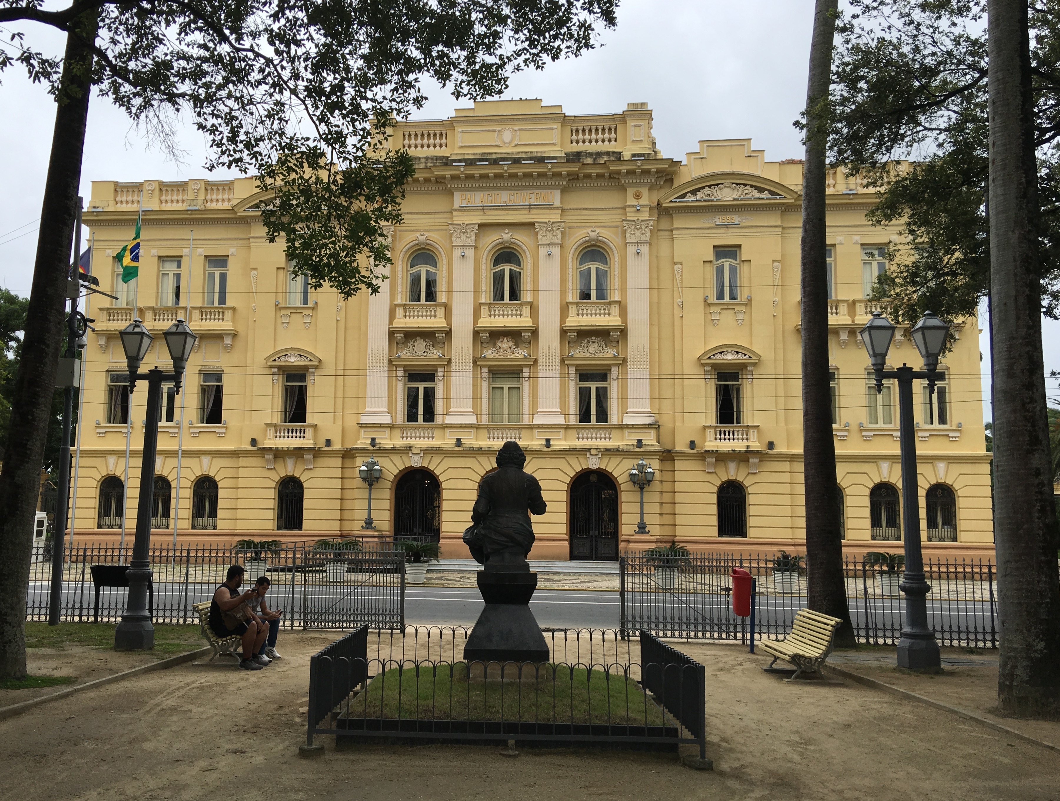 Palácio do Campo das Princesas do Recife